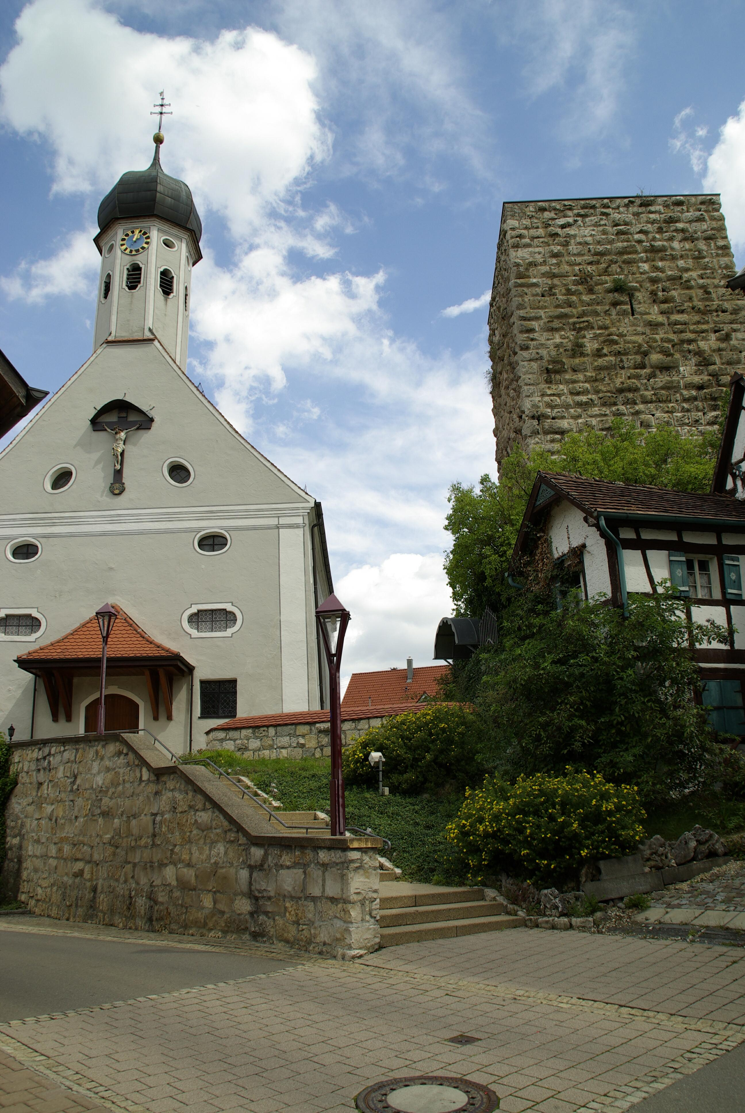 Sicht auf die Jungnauer Pfarrkirche St. Anna, den erhalten Bergfried der Burg Jungnau und die alte Post.